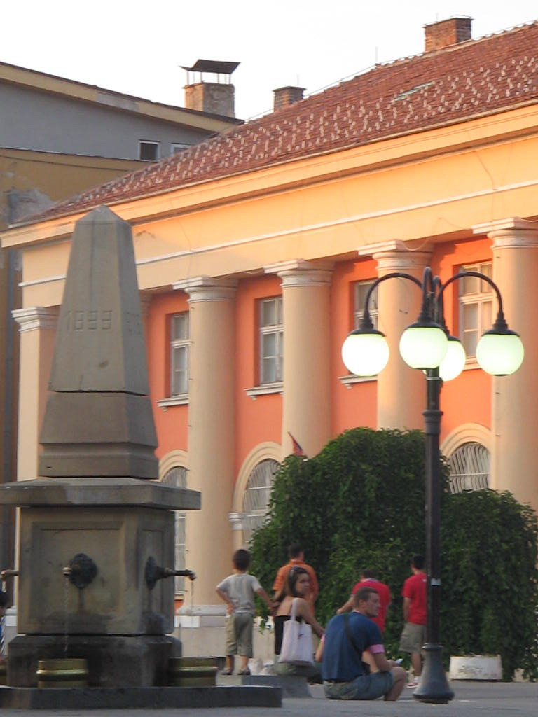 Česma na trgu u Zaječaru